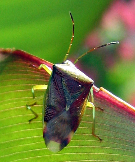 Beschreibung: Bunte Blattwanze (Elasmostethus interstinctus) Fotograf: Benutzer:Darkone, 18. September 2004